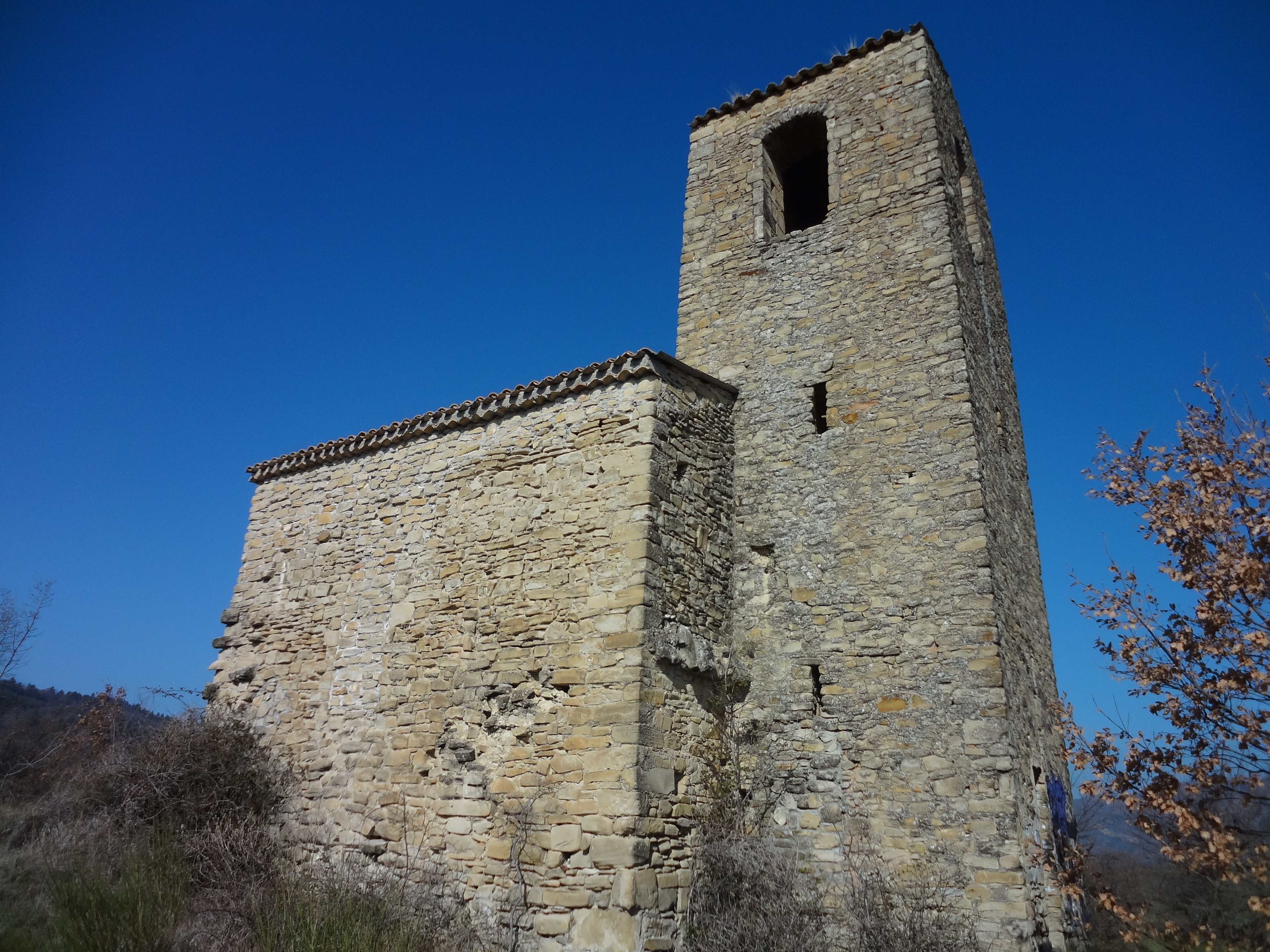 clocher de l’église de la Paroisse, ou Notre-Dame-des-Grenouillères, ou encore Saint-Jean-de-Barrabine, à Mirabeau (AHP)